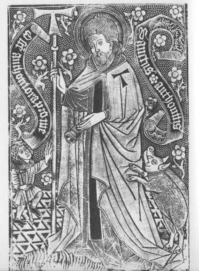 Steel engraving (Cologne 1470/80)